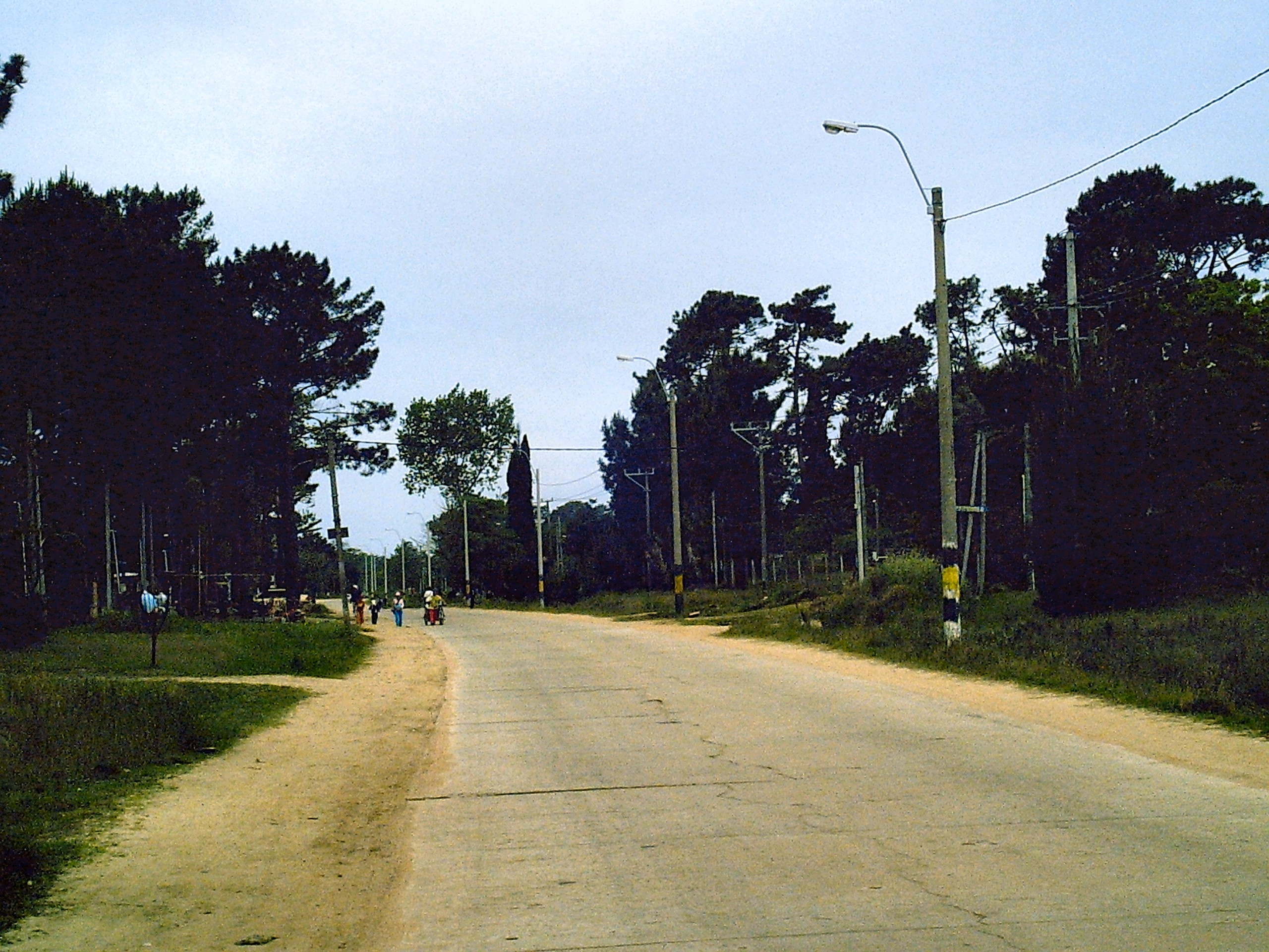 foto de la calle Pérez Butler, conocida popularmente como el hormigon